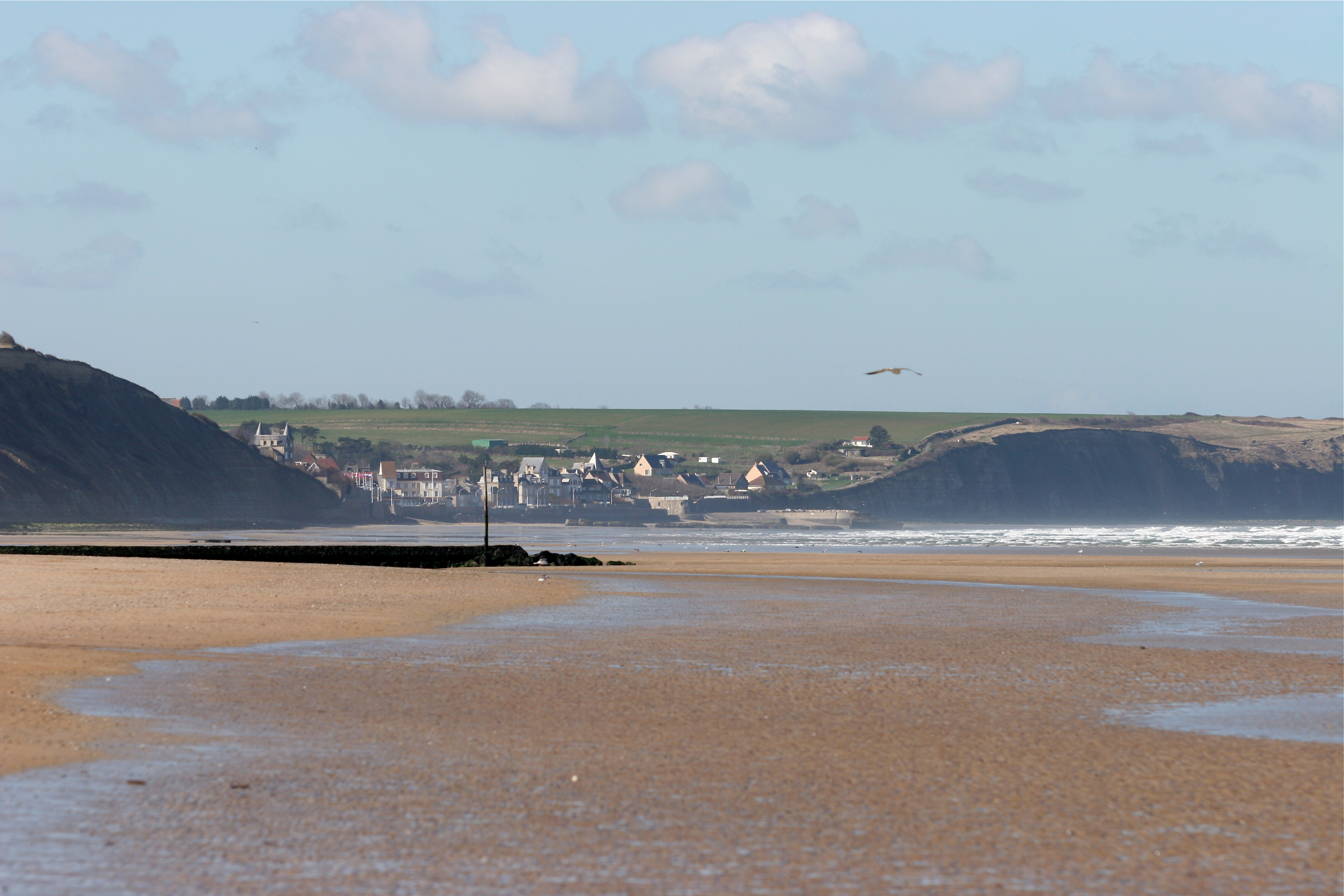 Arromanches-les-Bains, vu depuis la plage d'Asnelles, Calvados, France.